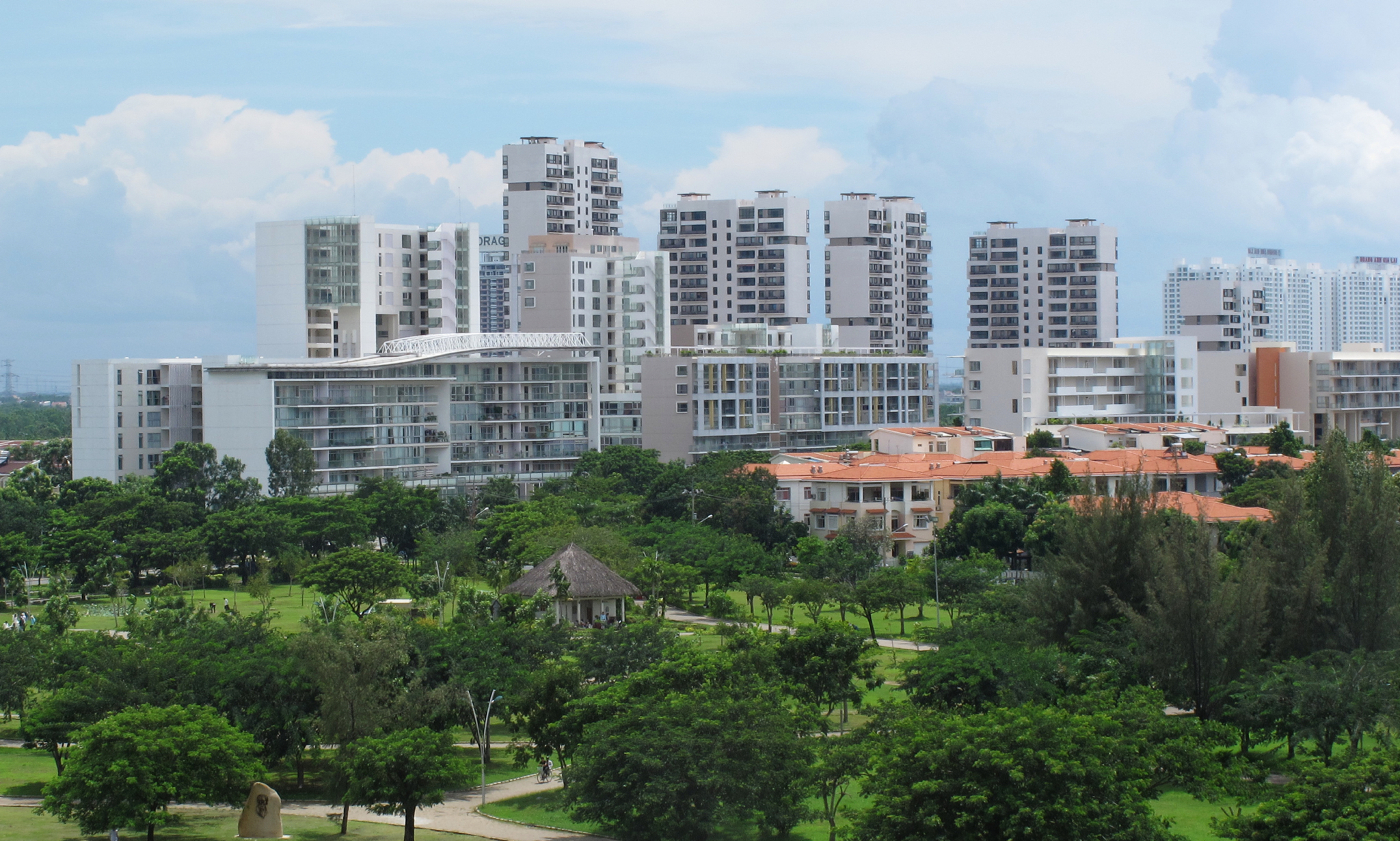 Phú mỹ hưng,quận 7, tpHcm